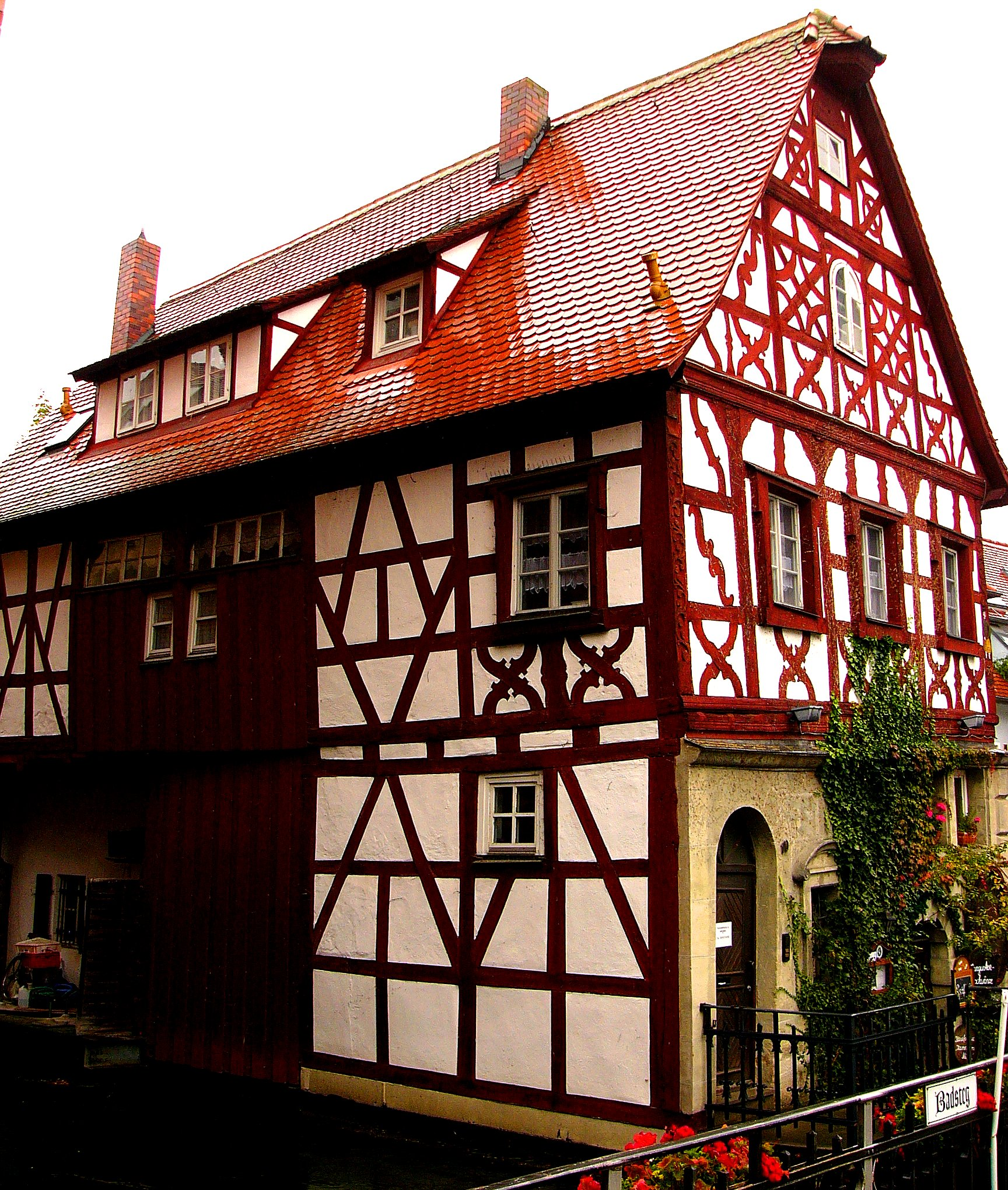 Ehem. Mühle, sog. Burkhart- oder Kammerermühle, zweigeschossiges Satteldachhaus, Zierfachwerkobergeschoß über Sandsteinquadererdgeschoß, bez. 1698. This is a photograph of an architectural monument.